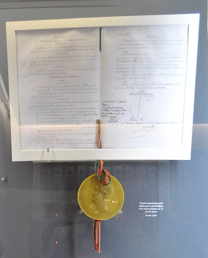 Fac-similé de la charte constitutionnelle signée par Louis-Philippe avec sceau pendant du roi en cire jaune. Photo prise dans la salle des sceaux du ministère de la justice lors des journées européennes du patrimoine de 2013.